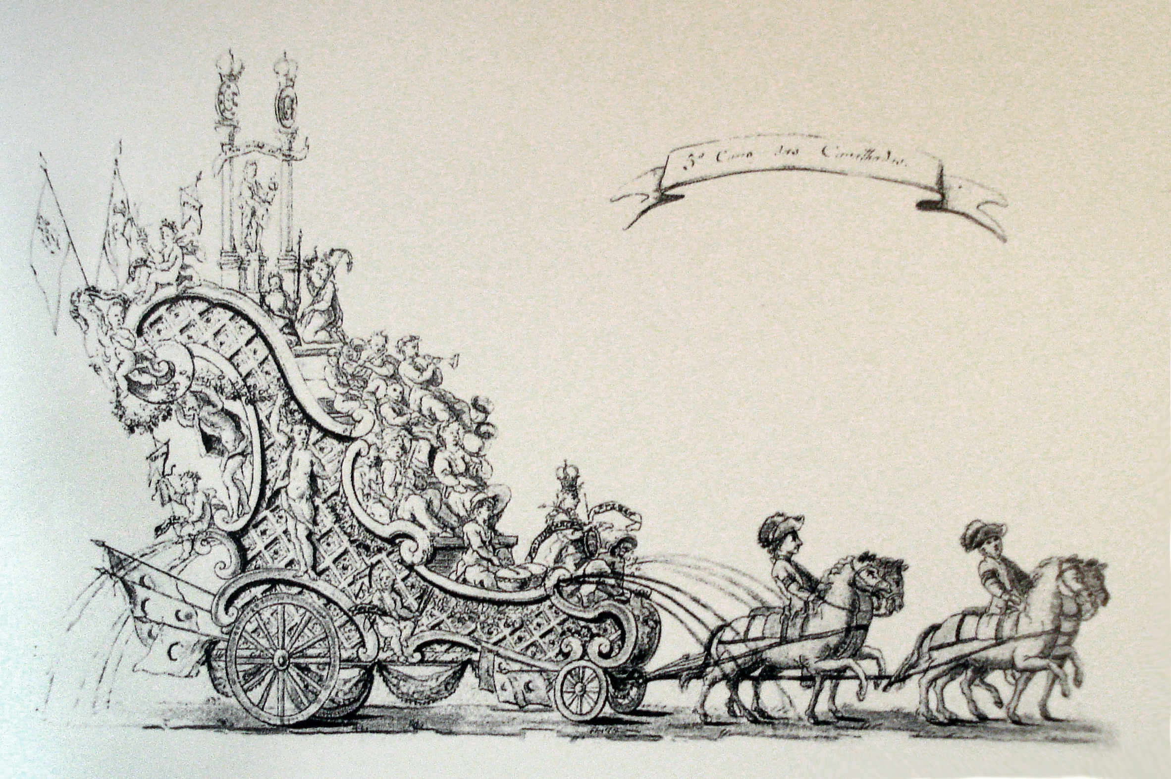 "Relação dos Magníficos carros, que se fizerão de arquitetura, perspectiva e fogos. Os quais, se executaram Por Ordem do Illust.mo e Excel.mo Senhor Luis de Vasconcelos, Capitão General de Mar e Terra, e Vice Rei dos Estados do Brazil, nas Festividades dos Despozorios Dos Serenissimos Senhores Infantes de Portugal - Nesta Cidade Capital do Rio de Janeiro. Em 2 de Fevereiro de 1786. Feita na Praça mais Lustroza, e publica do passeio desta cidade. Executados, e ideados, pelo O mínimo subdito Antônio Fran.co Soares Ajudante agregado".